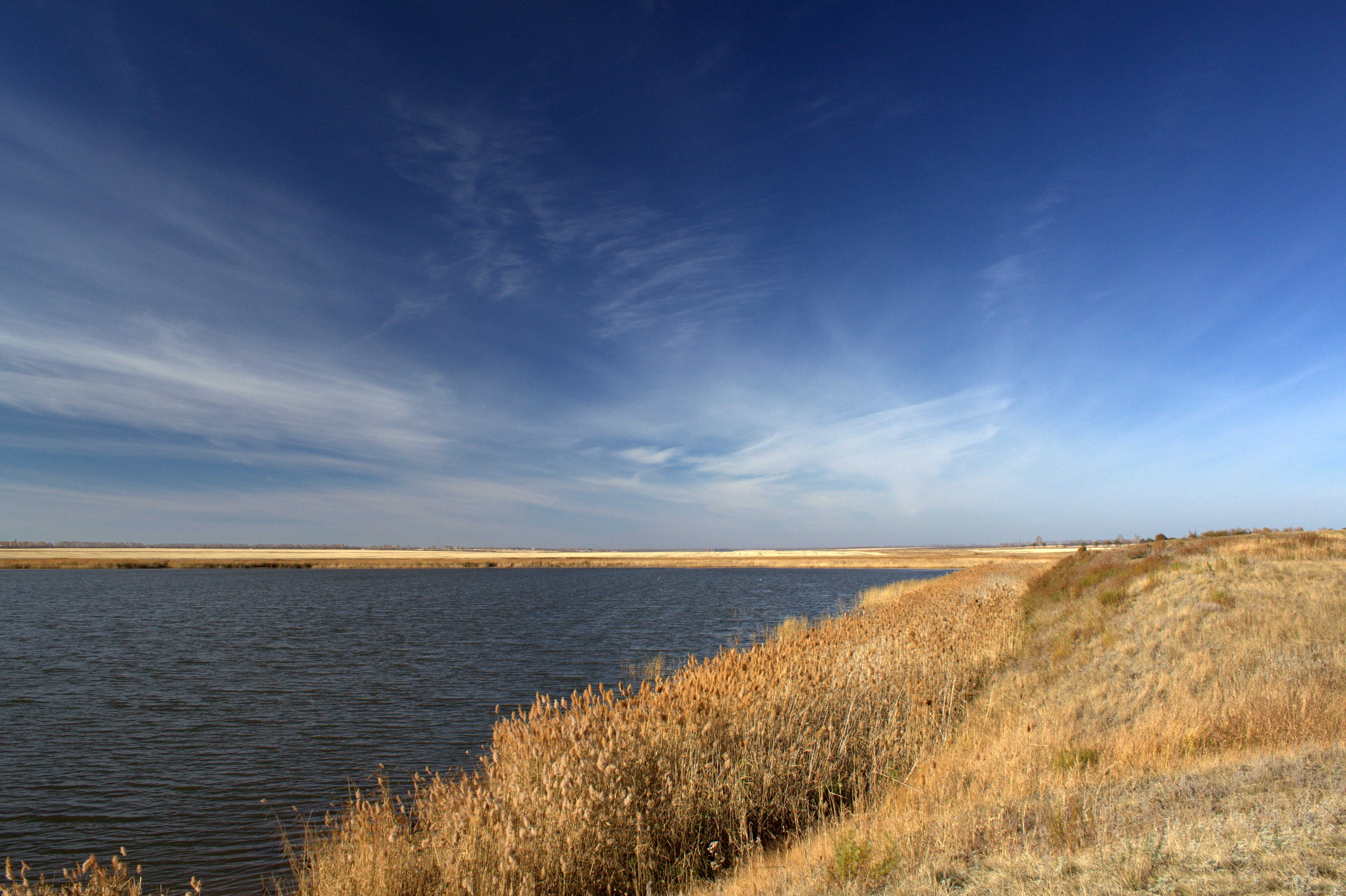 Покровское озеро в Марьяновском районе Омской области